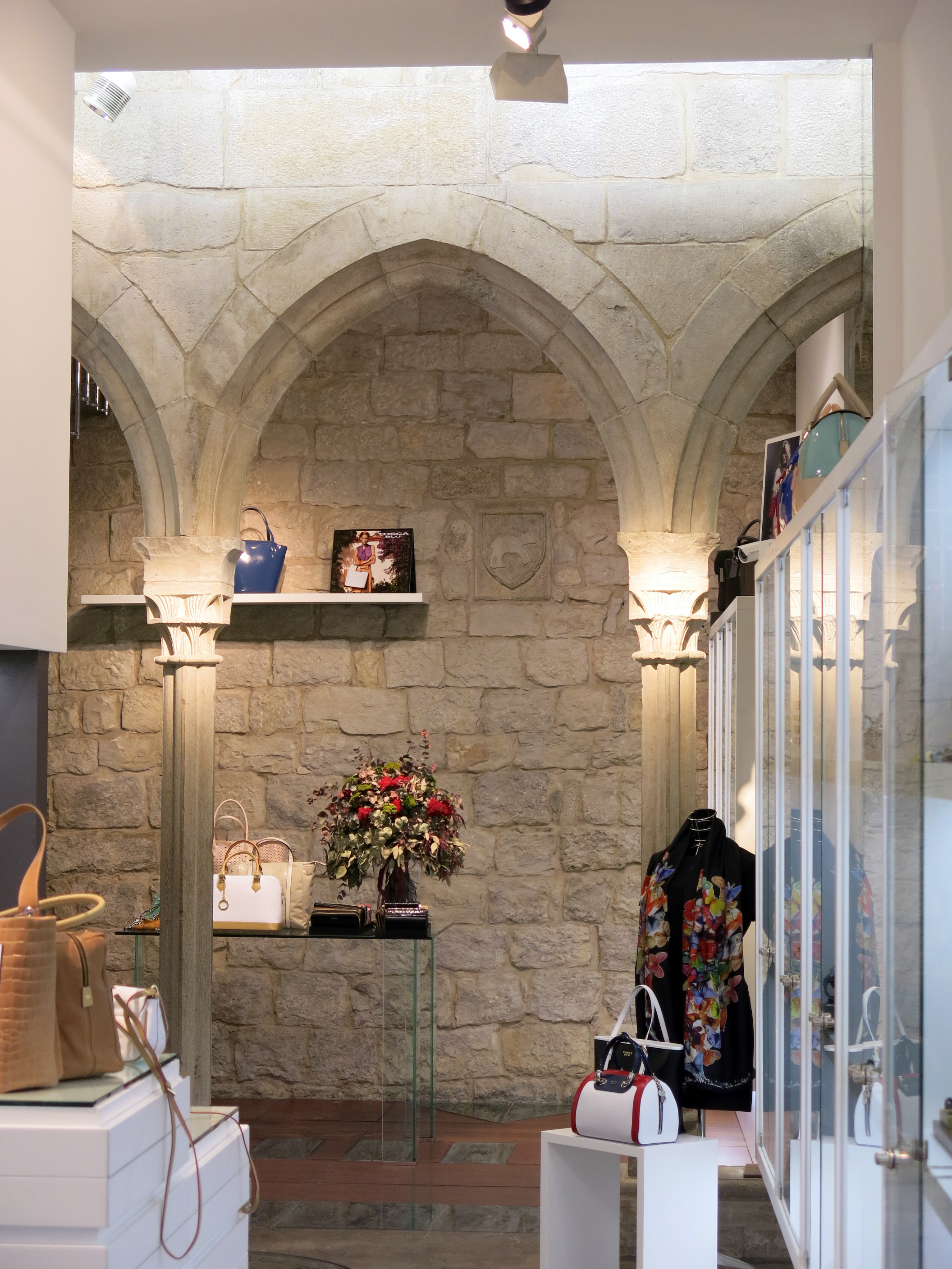 Restes del convent de Sant Francesc d'Assís (Girona)